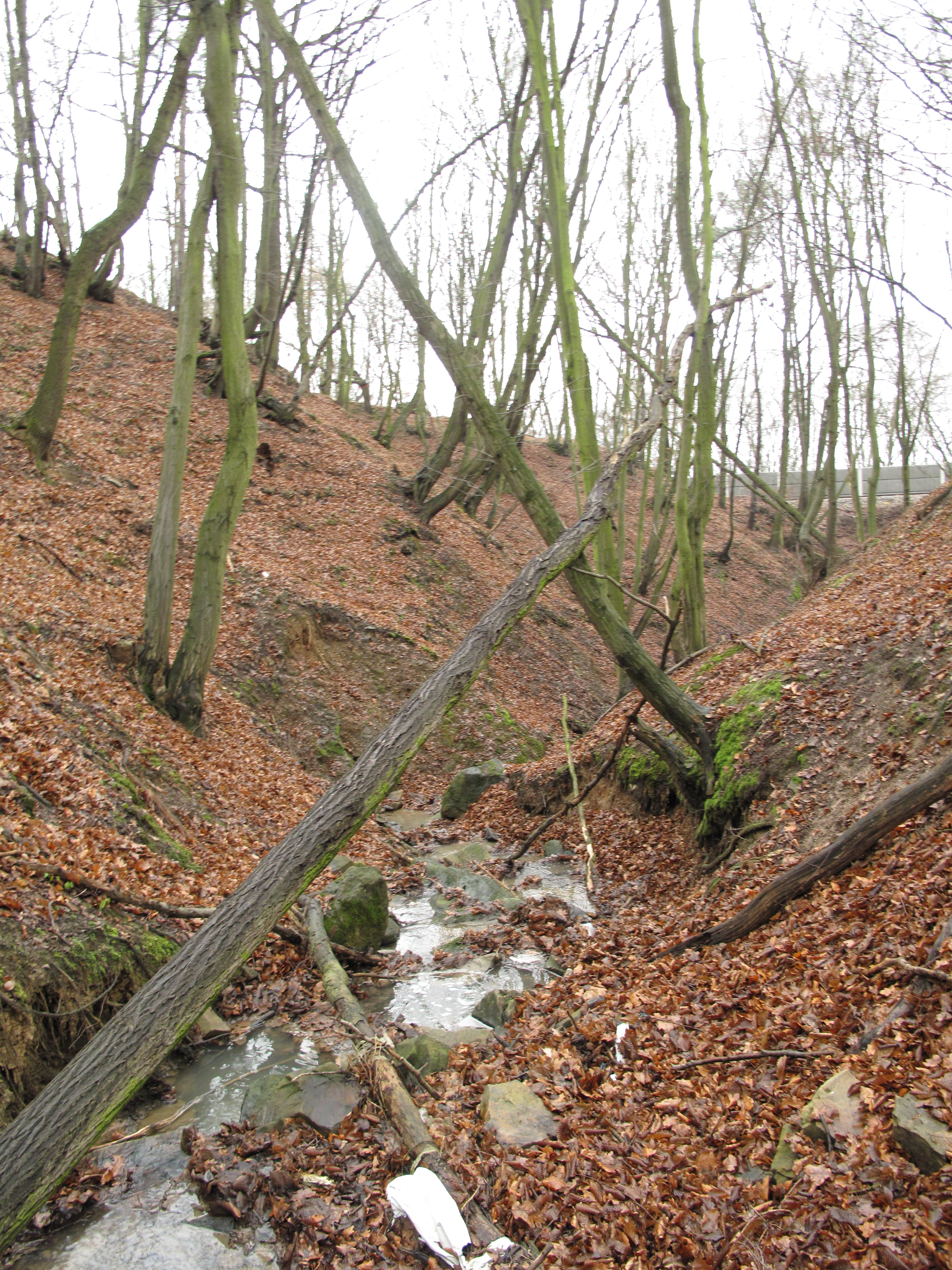 Potok v přírodní památce Pod Starým hradem. Okres Rokycany, Česká republika.